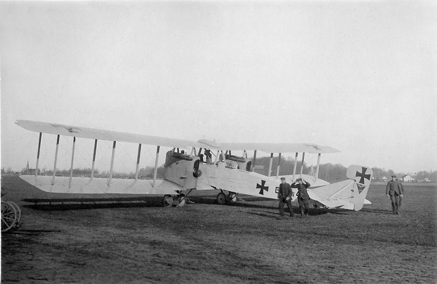 * Beim Kagohl III, die Englandflieger Gotha G IV, Kennung : RG + 406/16 Es handelt sich um ein Flugzeug des ersten Bauloses (Registrierungen 401/16 - 412/16), das bei Idflieg (Inspekteur der Fliegertruppen) am 4 August 1916 geordert wurde Die Buchstaben RG stehen für die Namen der Besatzung Radke (Pilot) und Genth (Kommandant / Beobachter / Bordschütze und Navigator)